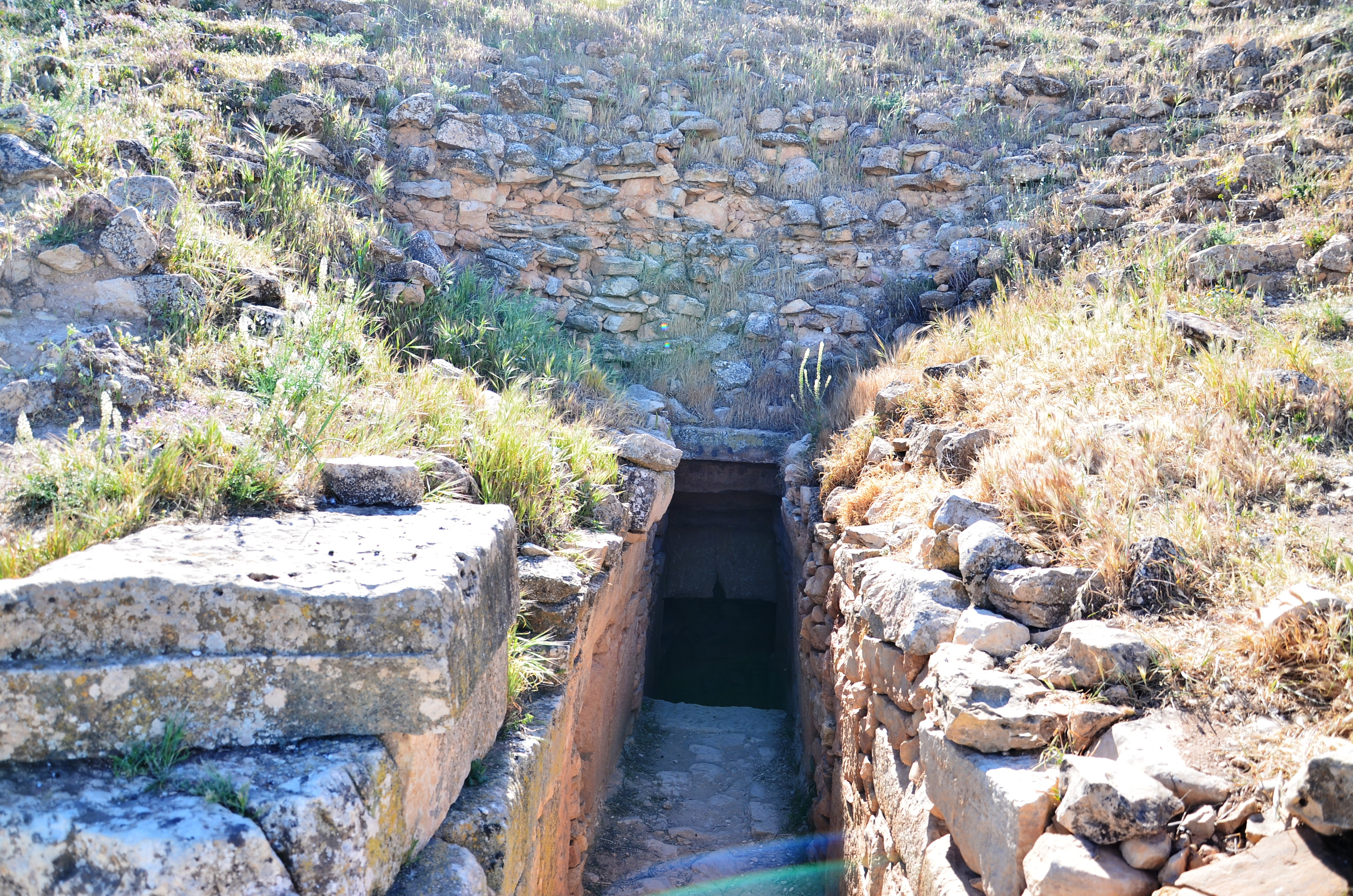 À l'époque qui s'étend de 429 à 671, c'est-à-dire du départ des Romains jusqu'à l'invasion Arabe, il y avait, dans l'Ouest algérien, des roitelets à la tête de principautés. Tels seraient les rois berbères enterrés dans les Djeddars près de Frenda et dont la capitale parait avoir été Tsinouna